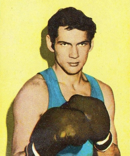 MUNCHEN/MONACO '72-PANINI-Figurina n.23- BEYER-DDR-PUGILATO-Recuperata